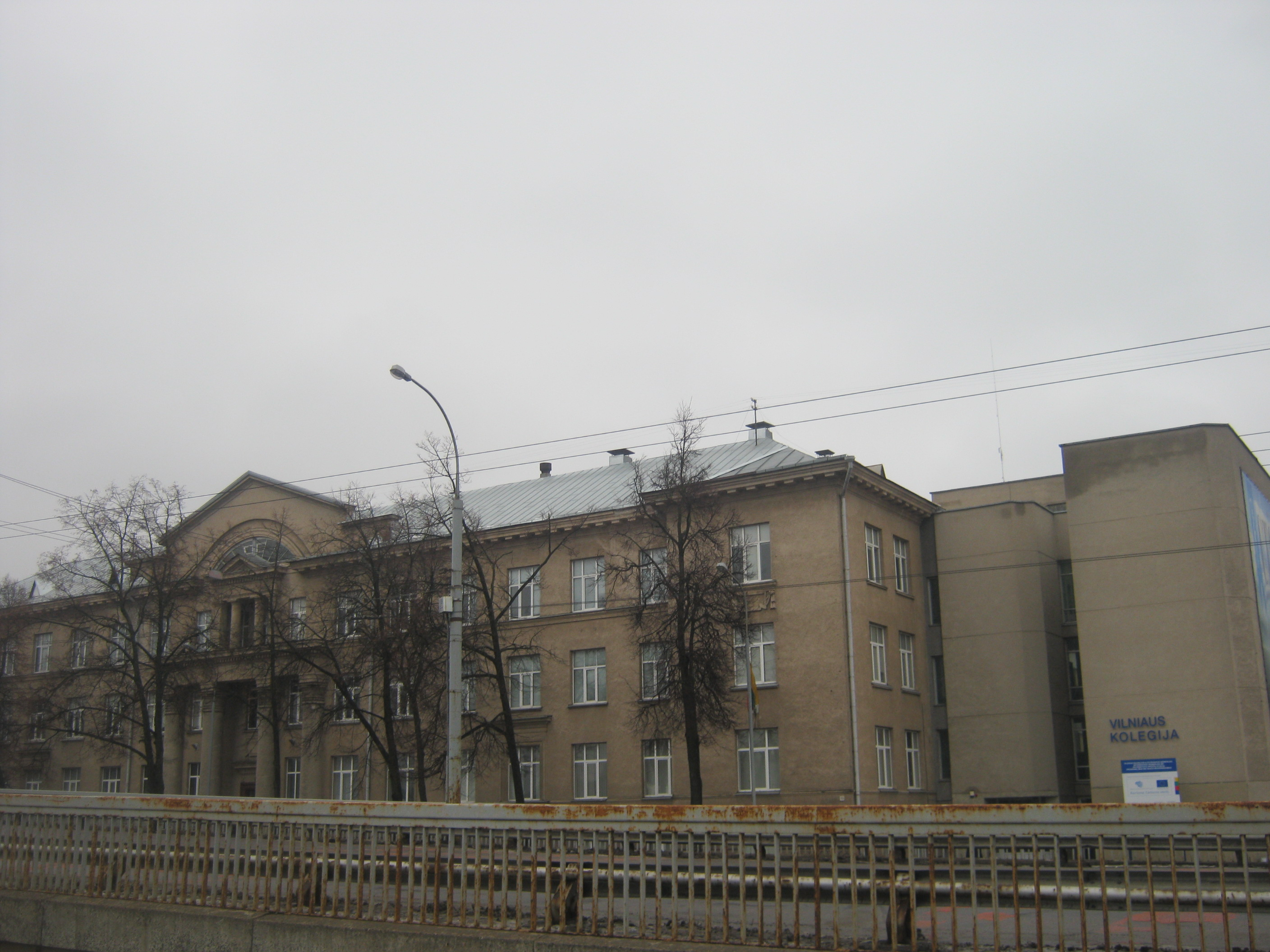 Vilniaus kolegija - elektronikos ir informatikos fakultetas